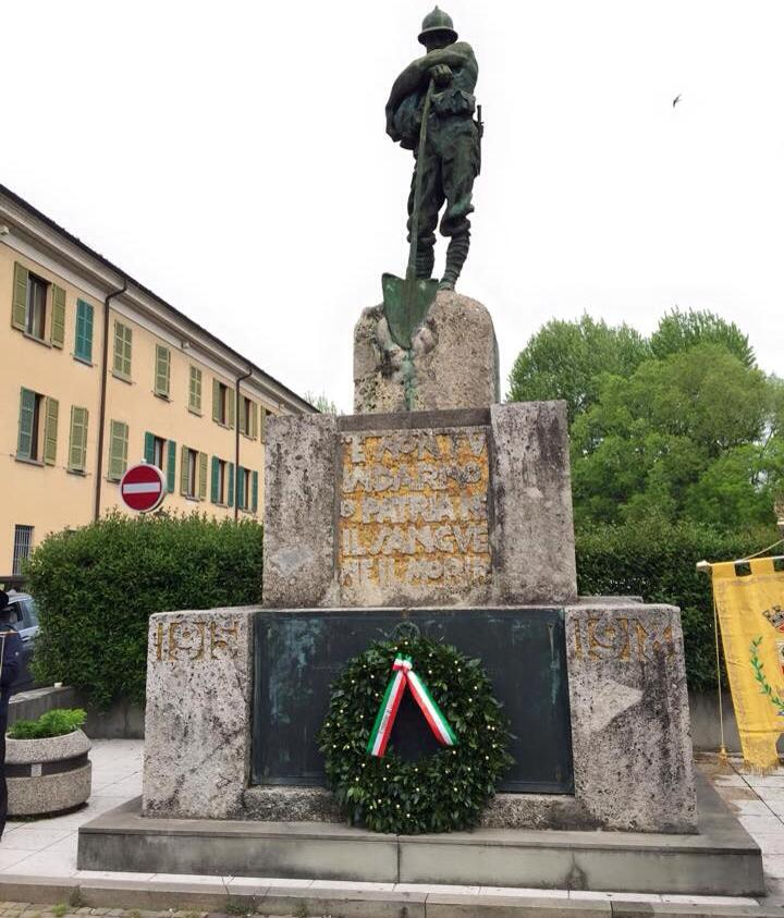 Monumento ai caduti della seconda guerra mondiale a Chiari